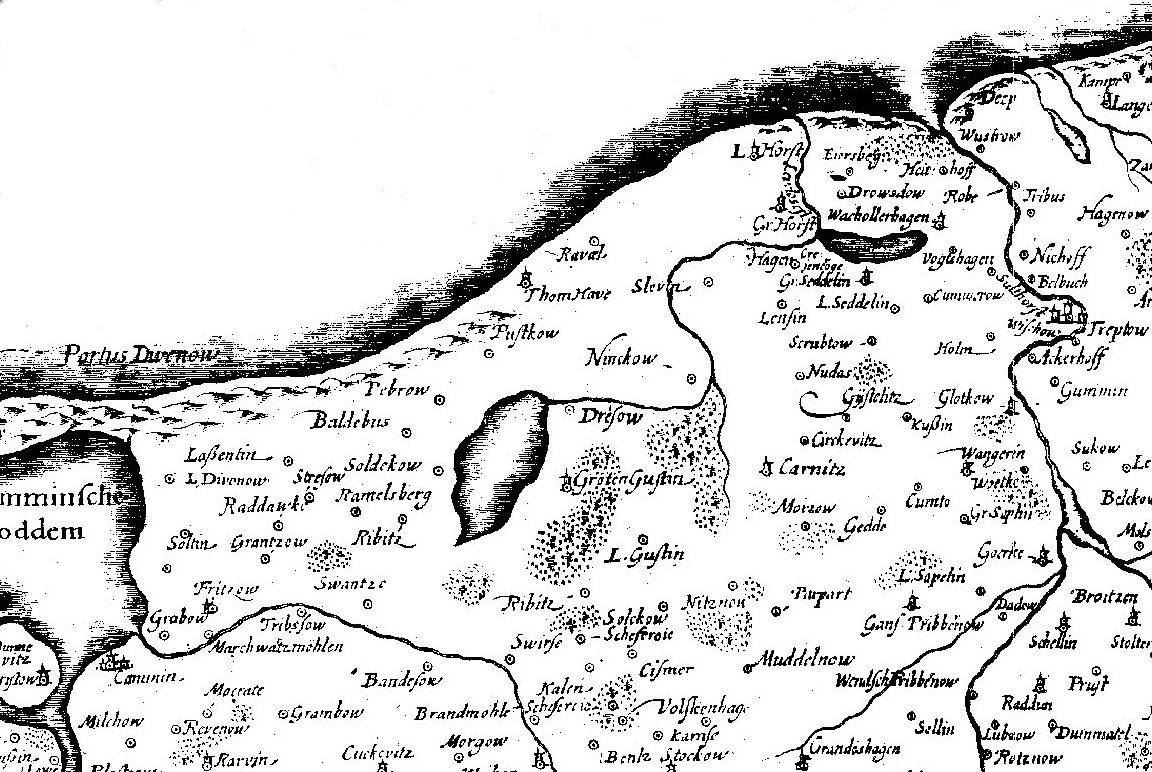 Große Lubinsche Karte